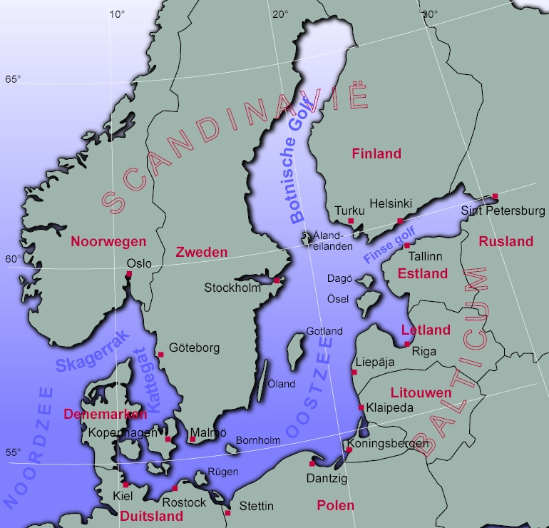 Oostzee kaart.